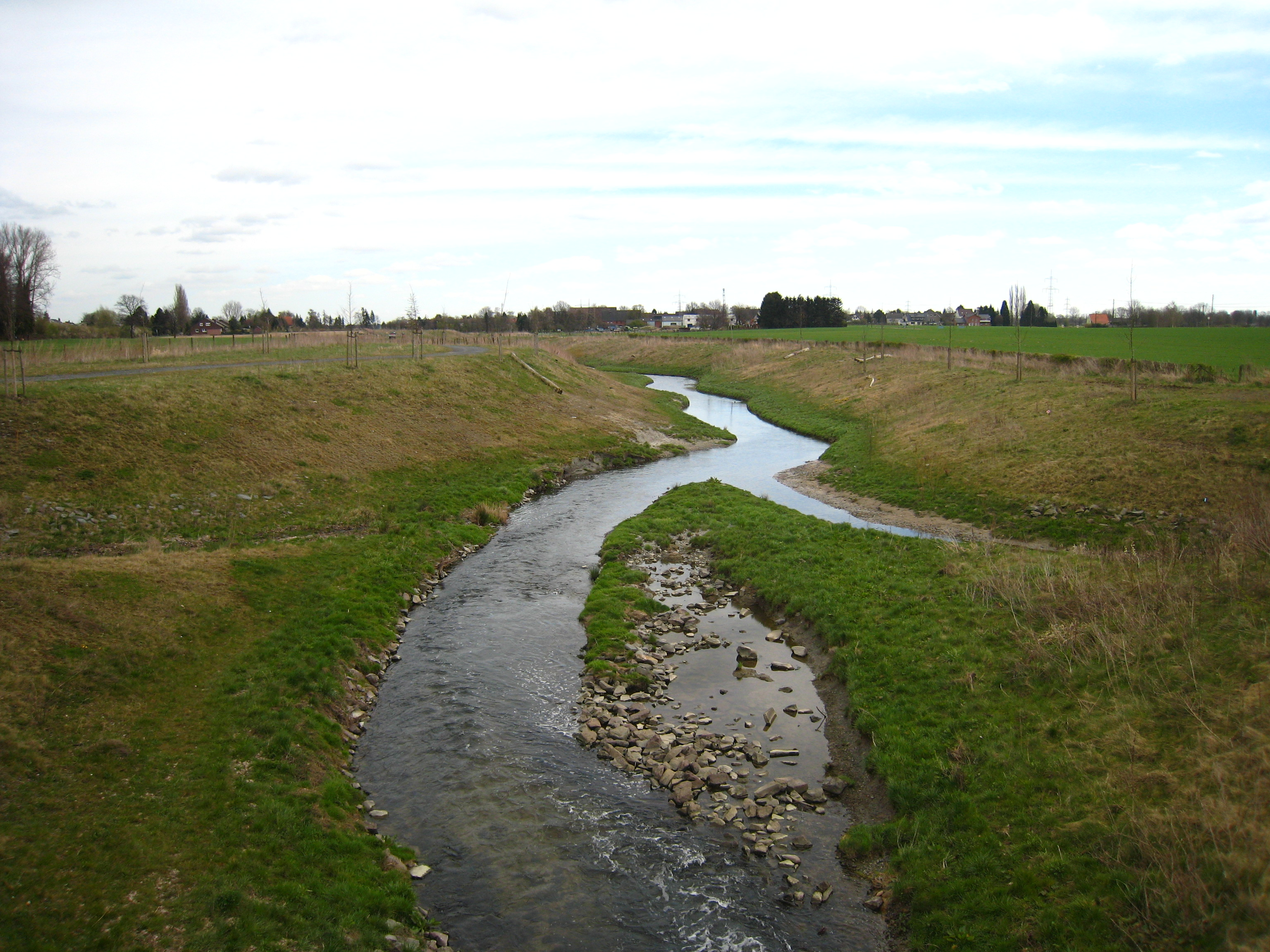 Körnebach, Fließrichtung Norden